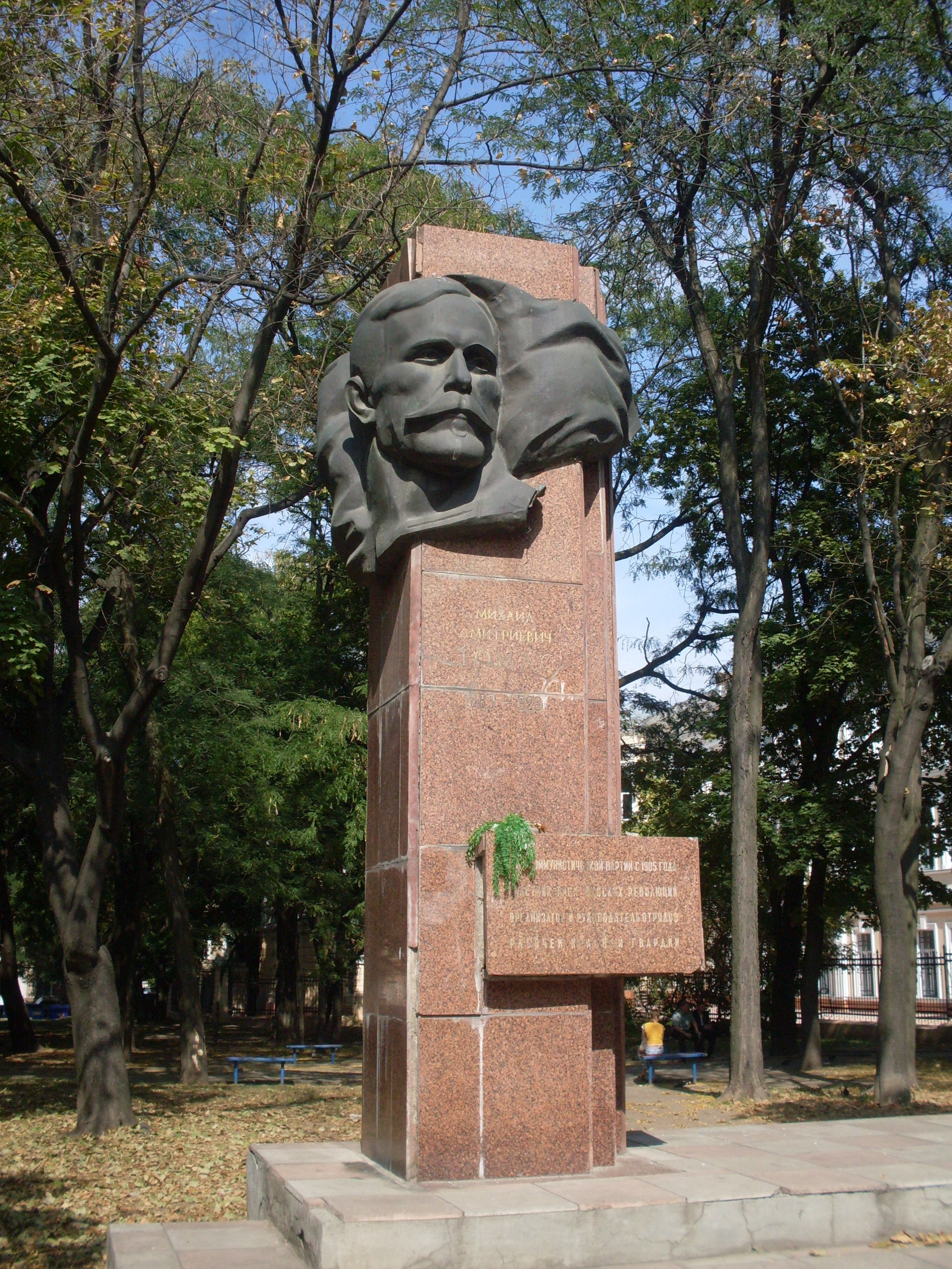 Пам’ятник учаснику 3-х революцій, організатору і керівнику загонів Червоної гвардії у м. Одесі М.Д. Томасу. Італійський бул., сквер ім. Томаса